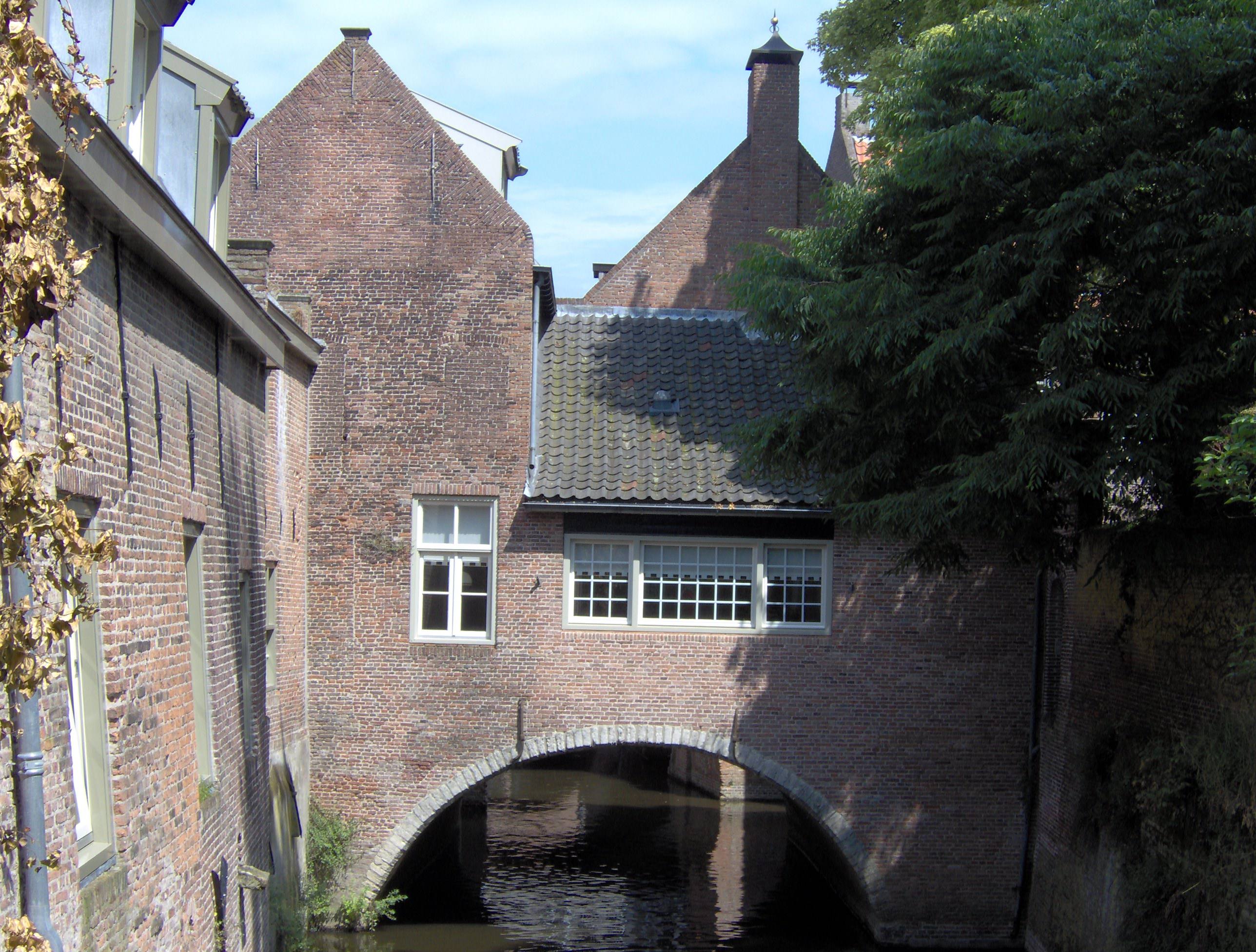 Binnendieze nabij de Uilenburg Den Bosch eigen foto categorie:afbeelding 's-Hertogenbosch